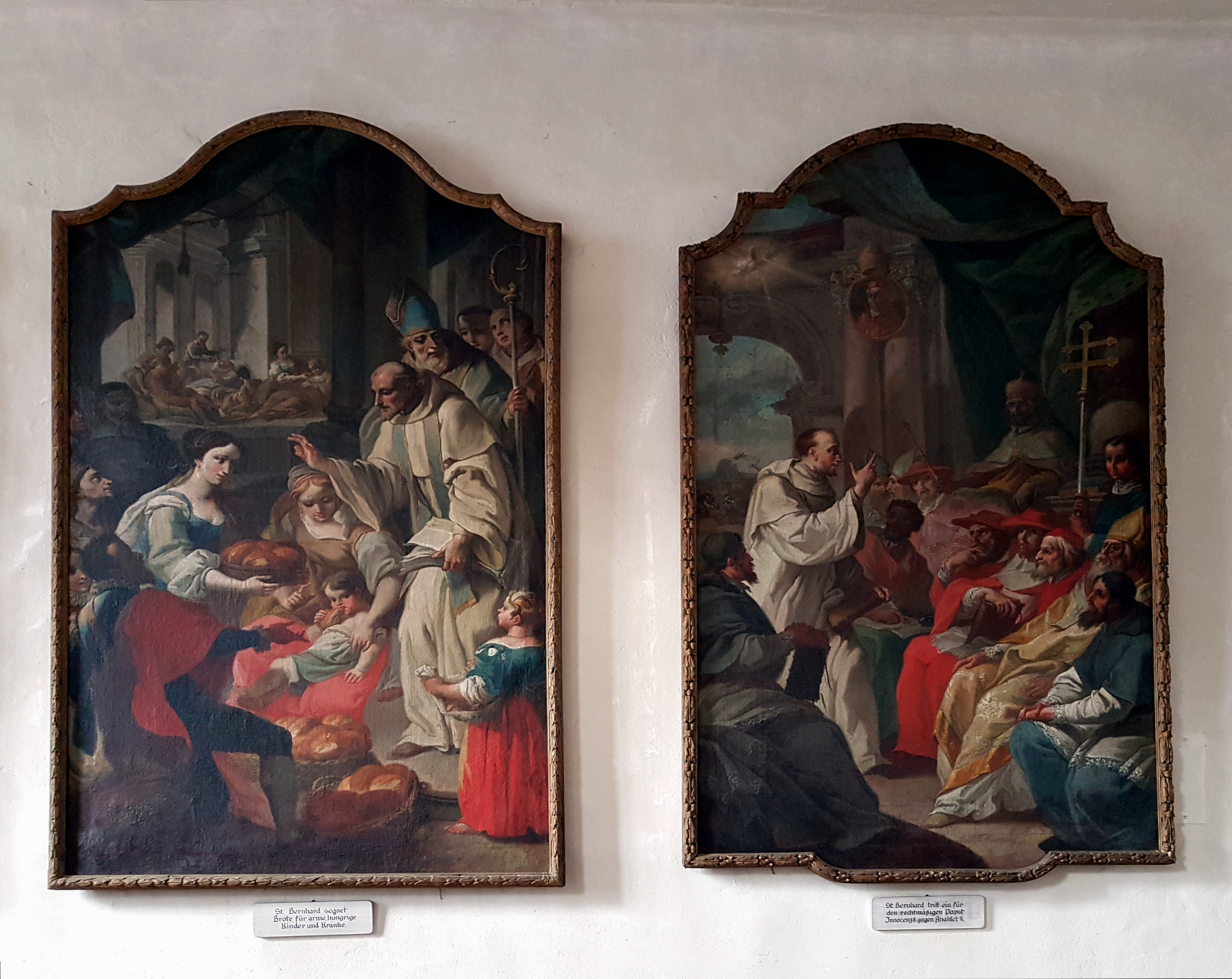 Liebfrauenmünster Donauwörth, Bernhardszyklus